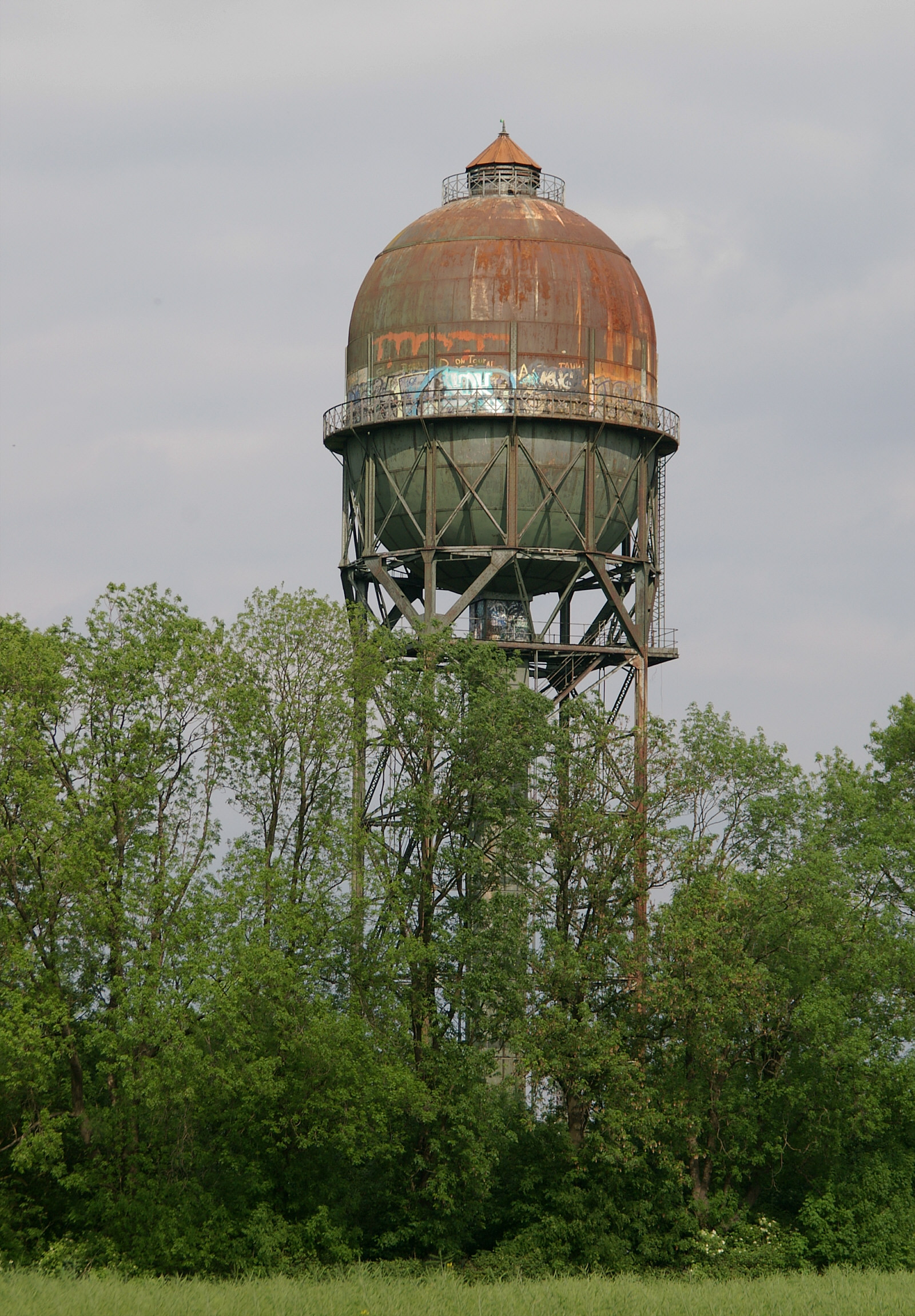 Wasserturm Lanstroper Ei, Dortmund, Nordrhein-Westfalen